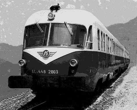 Automotrice Breda ALn 442-448 Foto di una automotrice